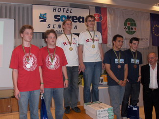 Majstri sveta v bridži v kategórii juniori za rok 2006. Vpravo Jose Damiani - prezident WBF.